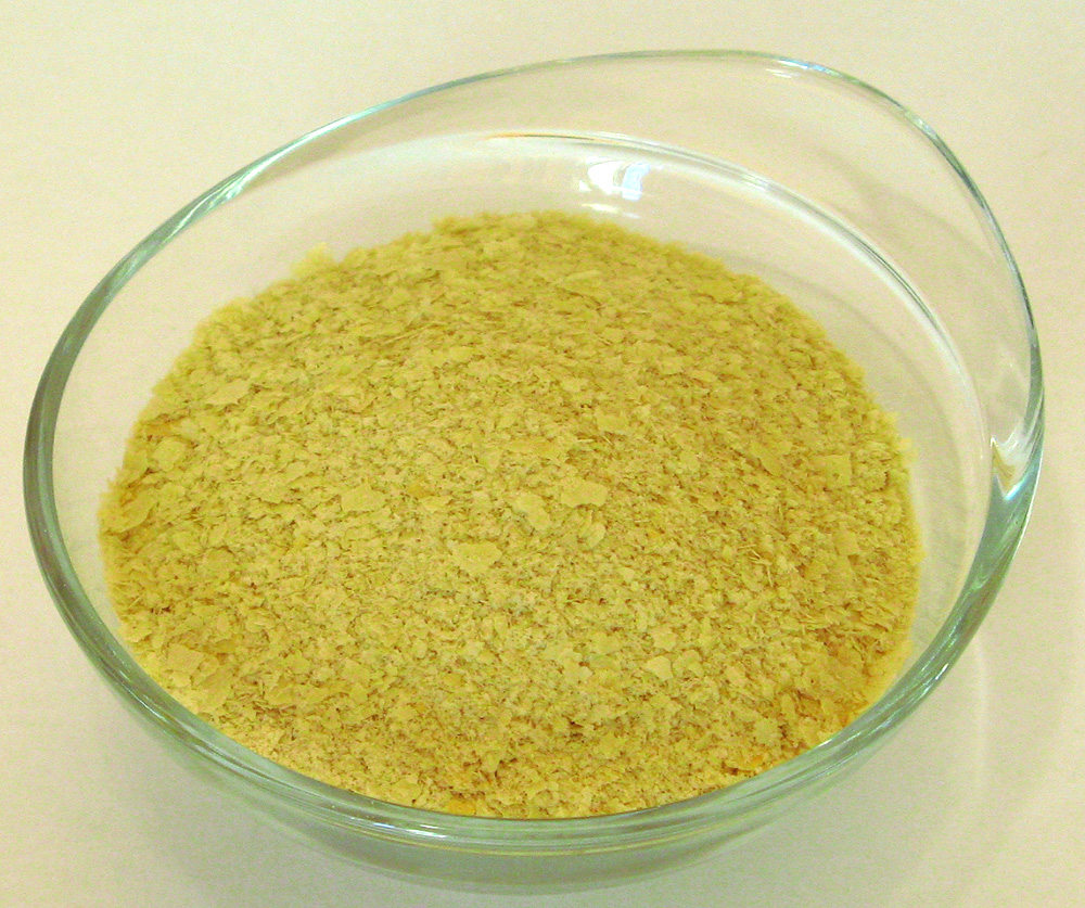 Nährhefeflocken der Marke "Naturata" (Melasse Würz-Hefeflocken) / nutritional yeast. Siehe auch/see also: Image:Hefeflocken_Naturata_(Verpackung).jpg